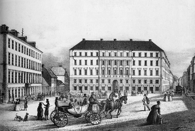 Brunkebergs hotell i fonden hade inte många resanderum utan var i första hand ett exklusivt våningshotell för burgna hyresgäster. I Hotel de la Croix t.v. fanns det inga gästrum alls. Där anordnades baler, utställningar och politiska möten. Litografi av Ferdinand Tollin omkring 1840. (Stockholms stadsmuseum)